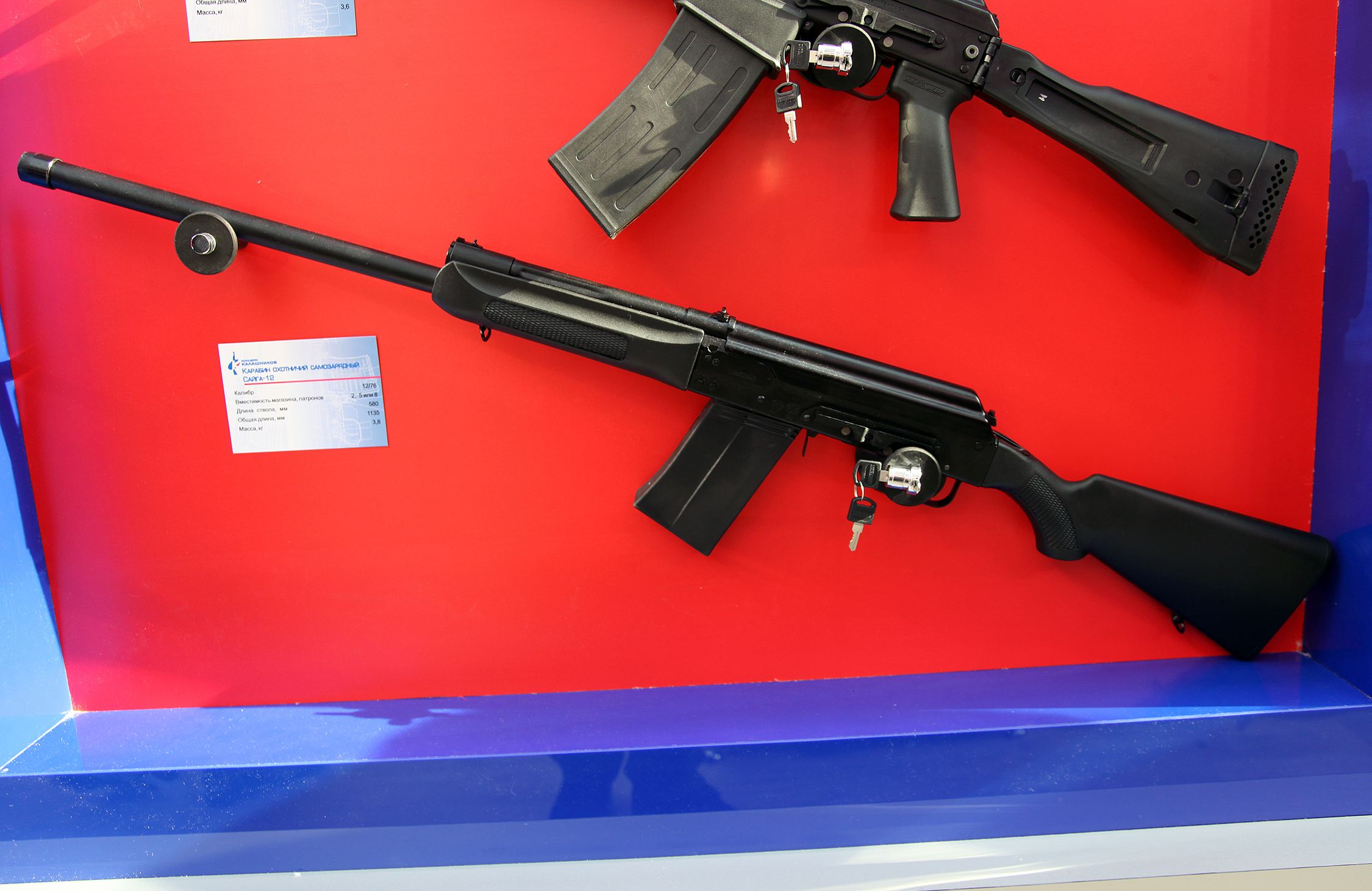 12х76 карабин Сайга-12 (12x76 Saiga-12)